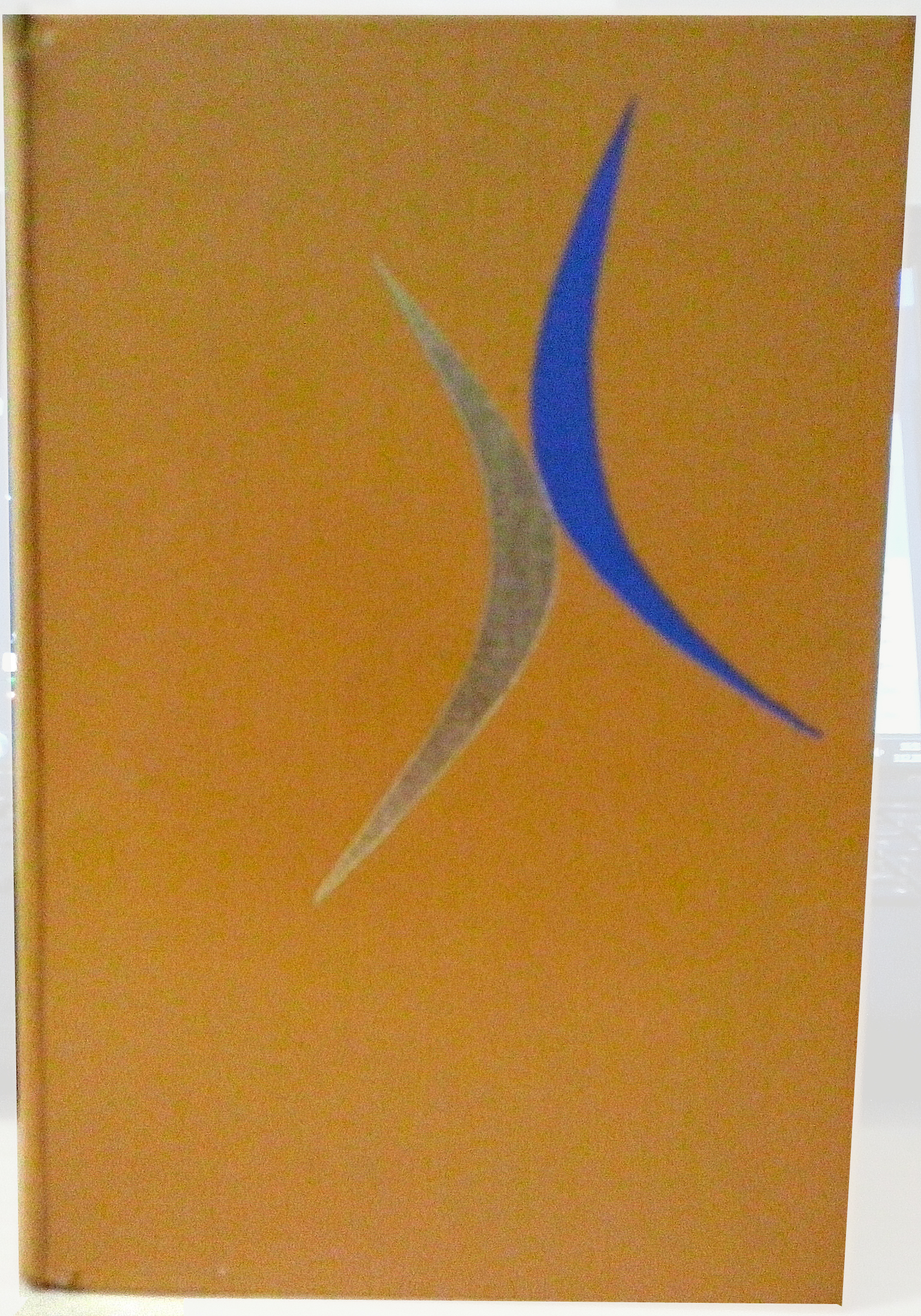 Naslovnica knjige Že nekoč, danes, jutri.